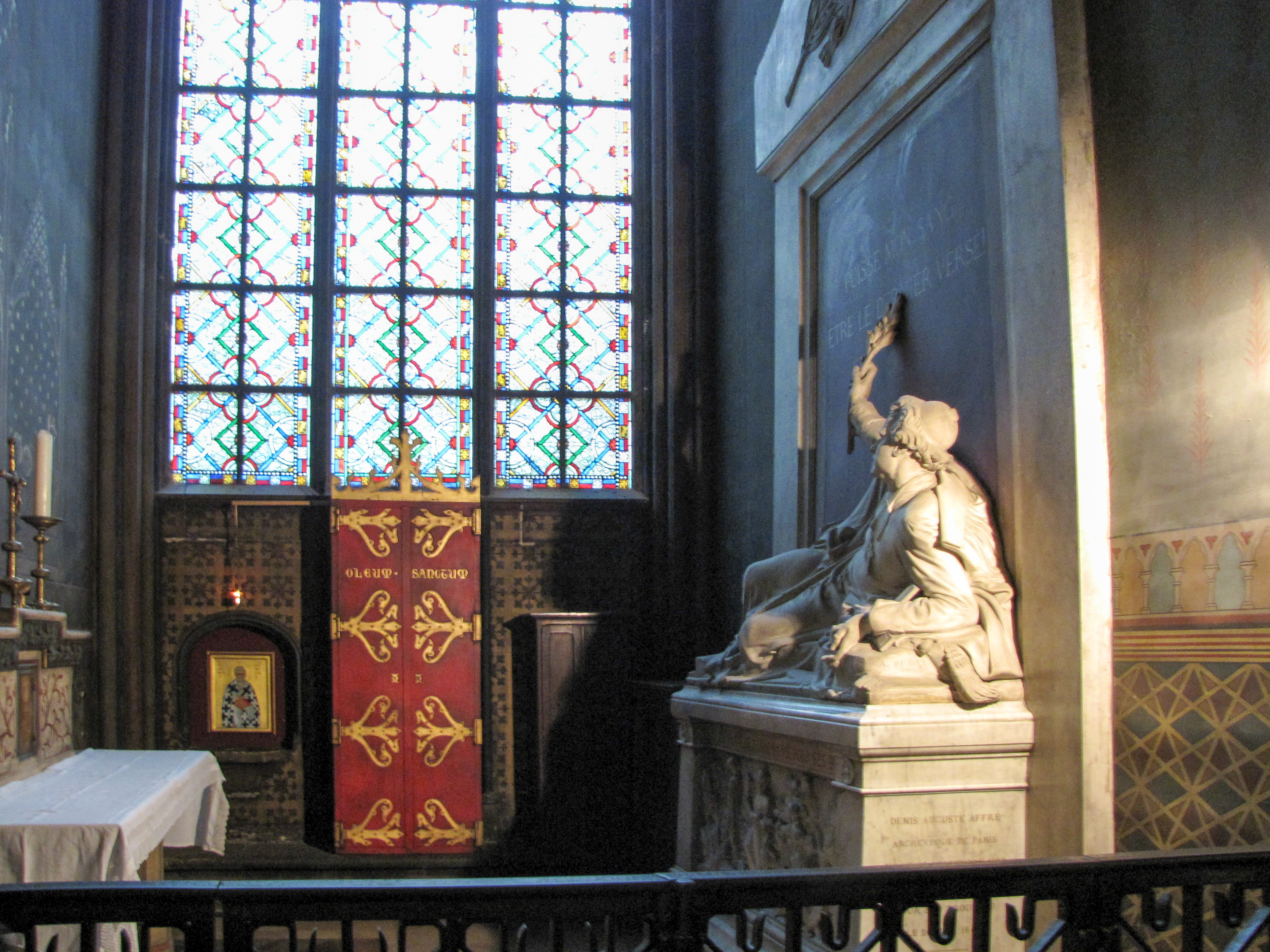 Собор Парижской Богоматери